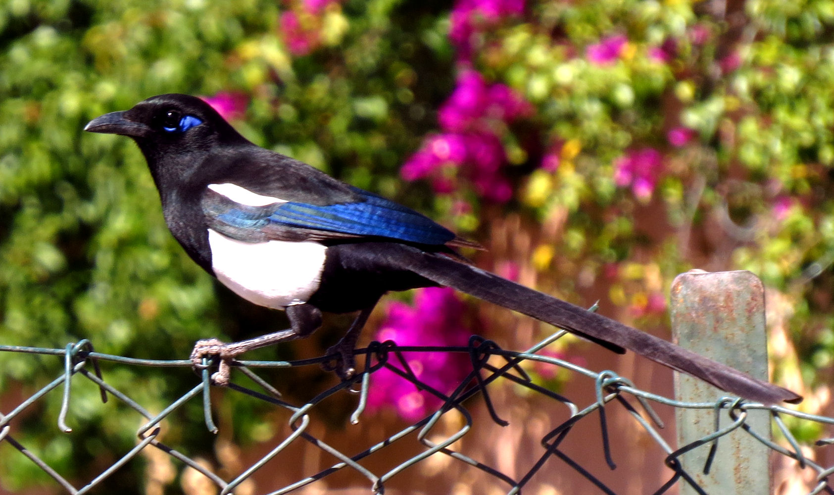 Maghreb Magpie Pica mauritanica, Marrakech, Morocco